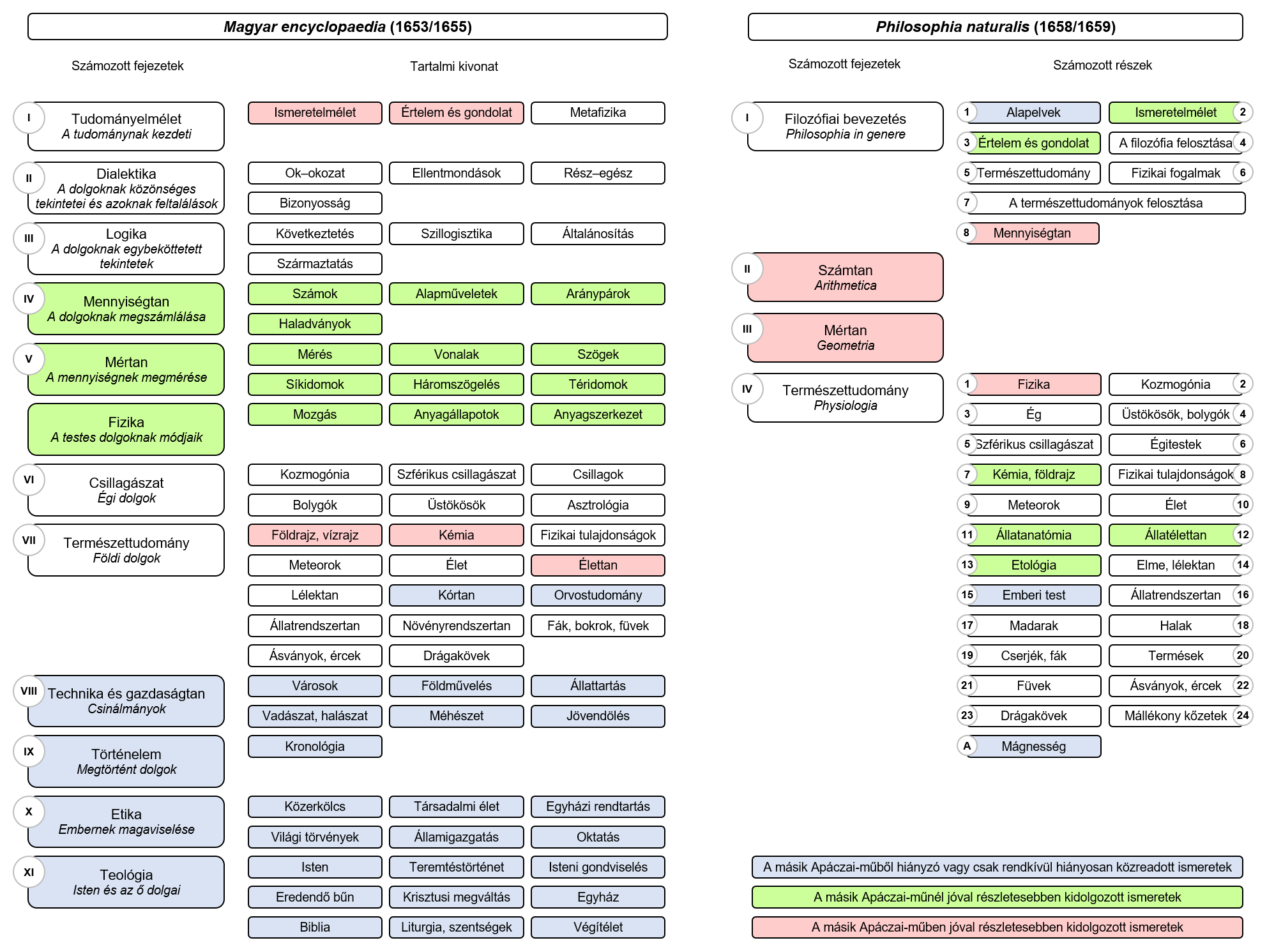 Apáczai Csere János tudástárai, a Magyar encyclopaedia és a Philosophia naturalis tartalmi szerkezetének összehasonlítása